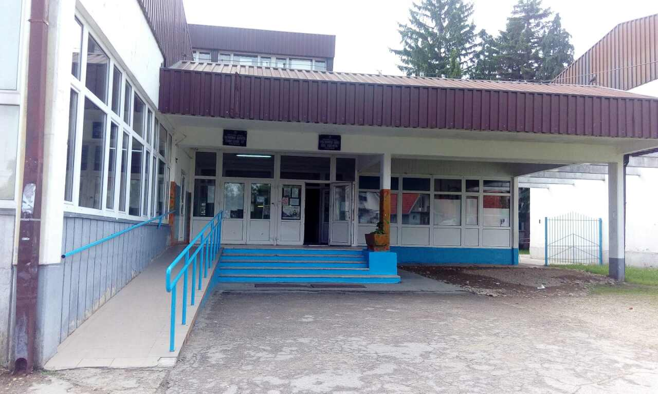 Zajednički ulaz u OŠ Stanimir Veljković Zele i TŠ Boško Krstić u Bojniku.